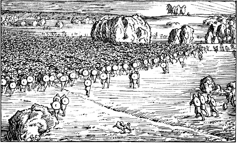 Halfdan Egedius: Illustration for Olav den helliges saga. Snorre 1899-edition. «Bøndernes Hær.» nb: «Bondehæren.» nn: «Bondehæren.»